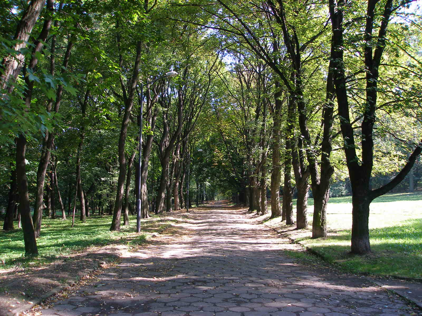 Park w Bytomiu.